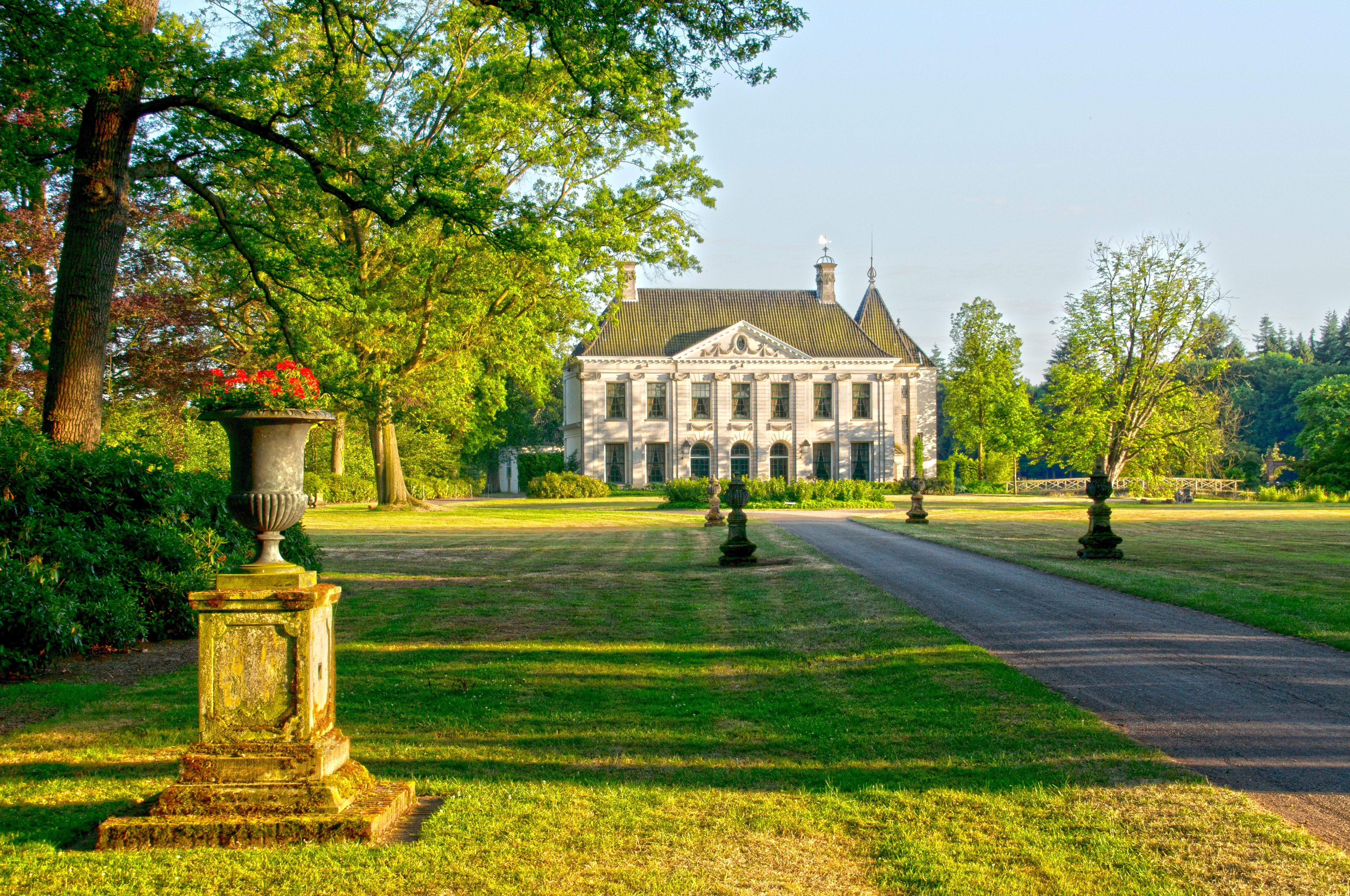 Huis Singraven, Overijssel (Nederland). HDR-bewerking.